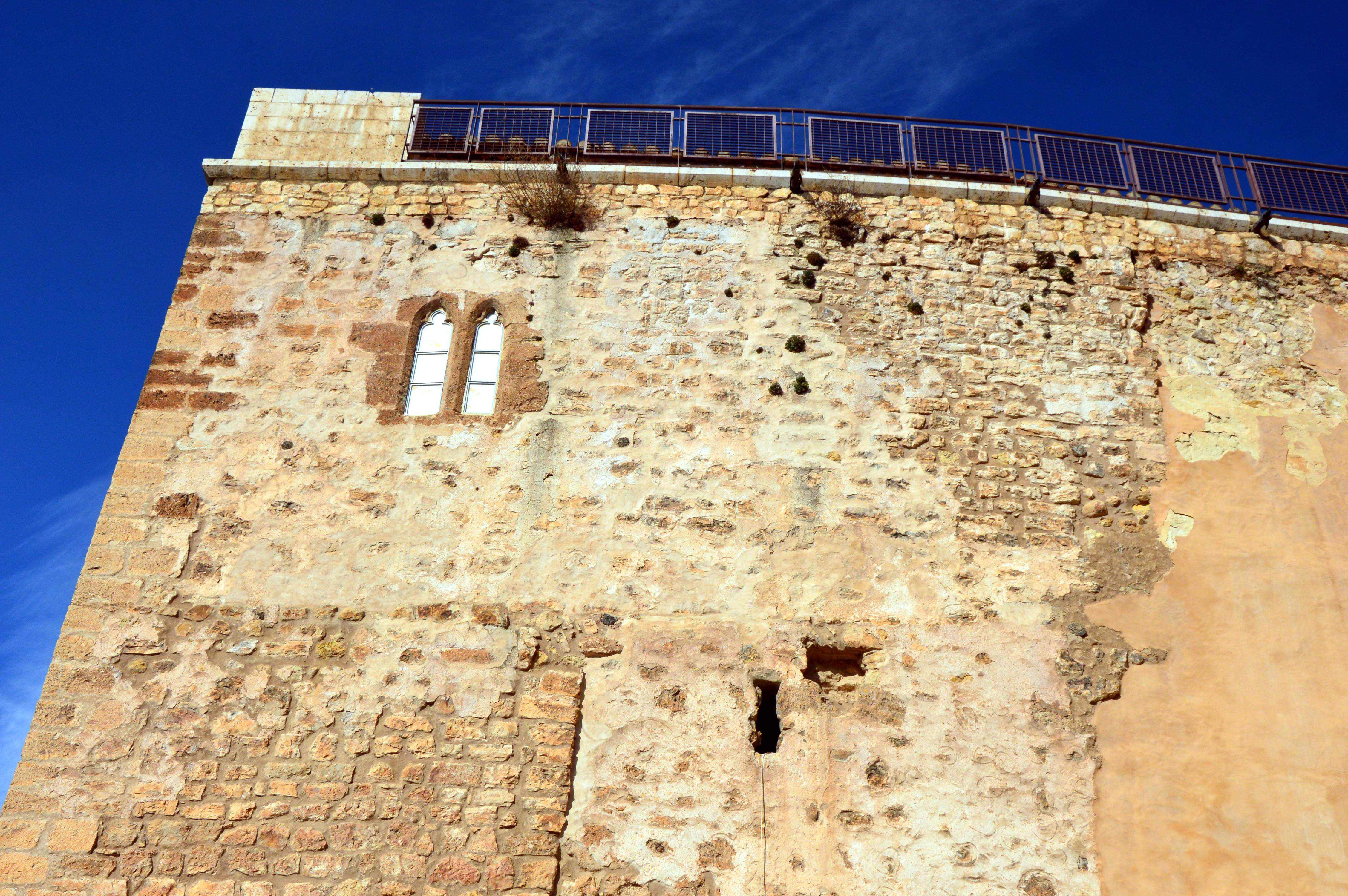 Fragmento del lienzo meridional del torreón donde se halla la Iglesia-fortaleza de Castielfabib (Valencia), con detalle de una ventana geminada, labrada en estilo gótico civil aragonés (2019).